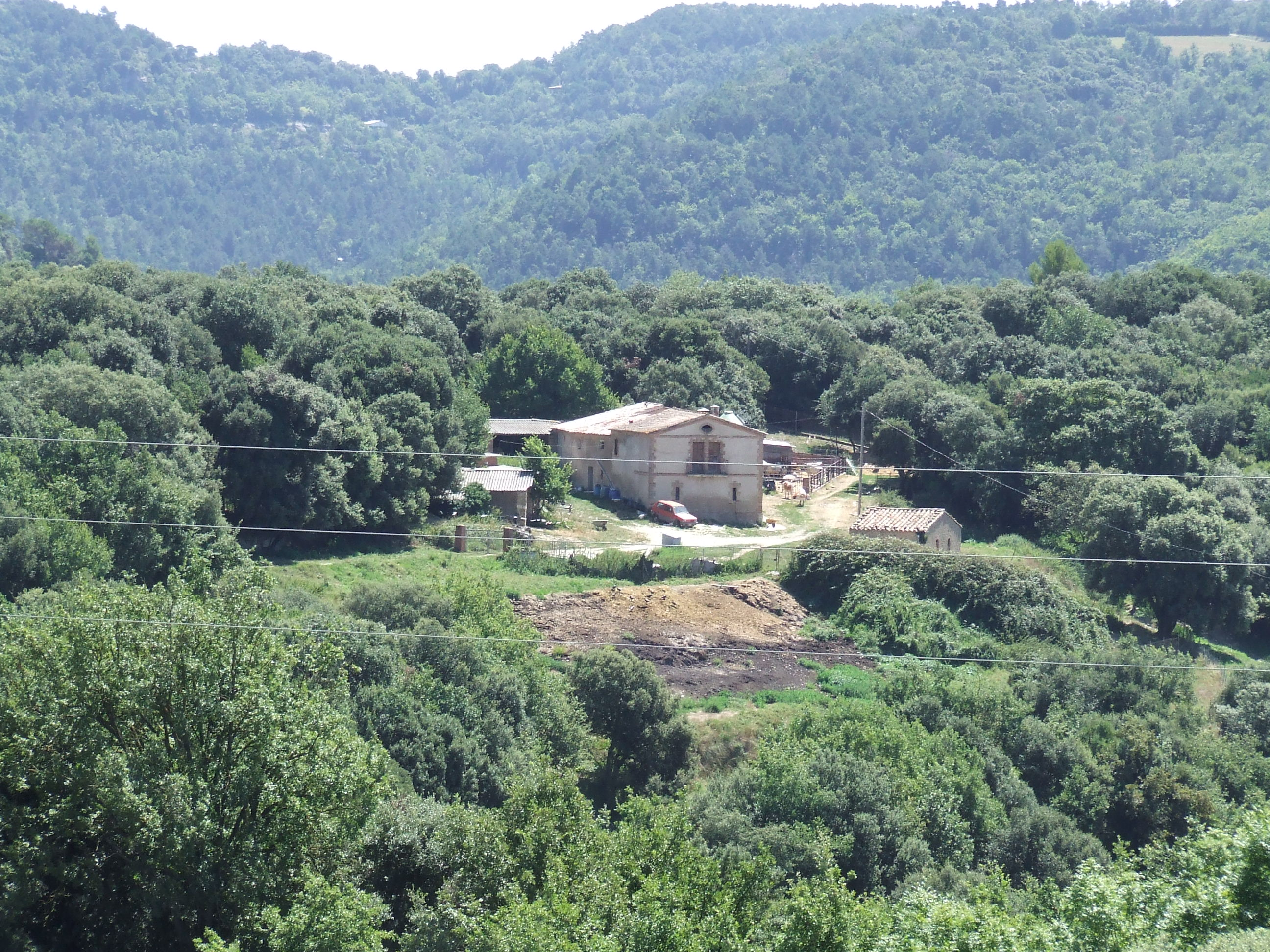 Serracaixeta (Santa Coloma Sasserra, Castellcir, Moianès)